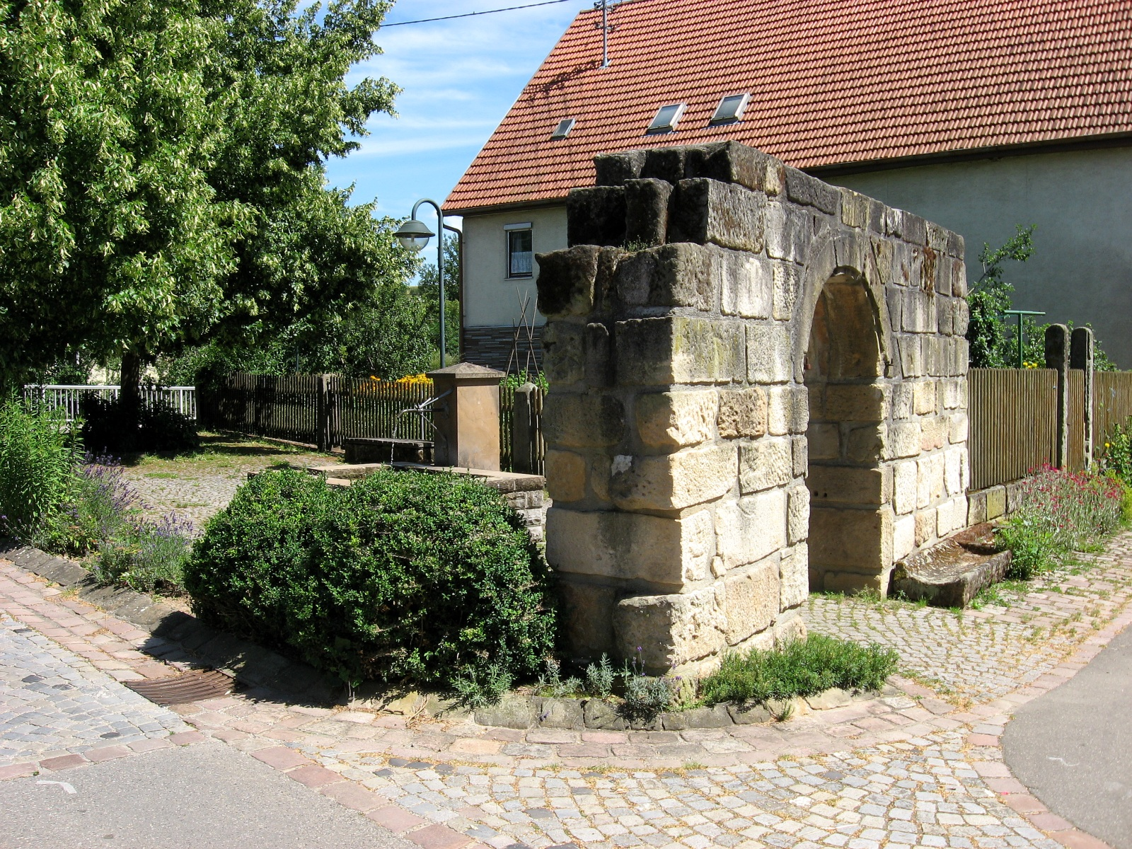 Aichtal-Grötzingen, Schulstraße